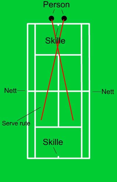 serve tennis court